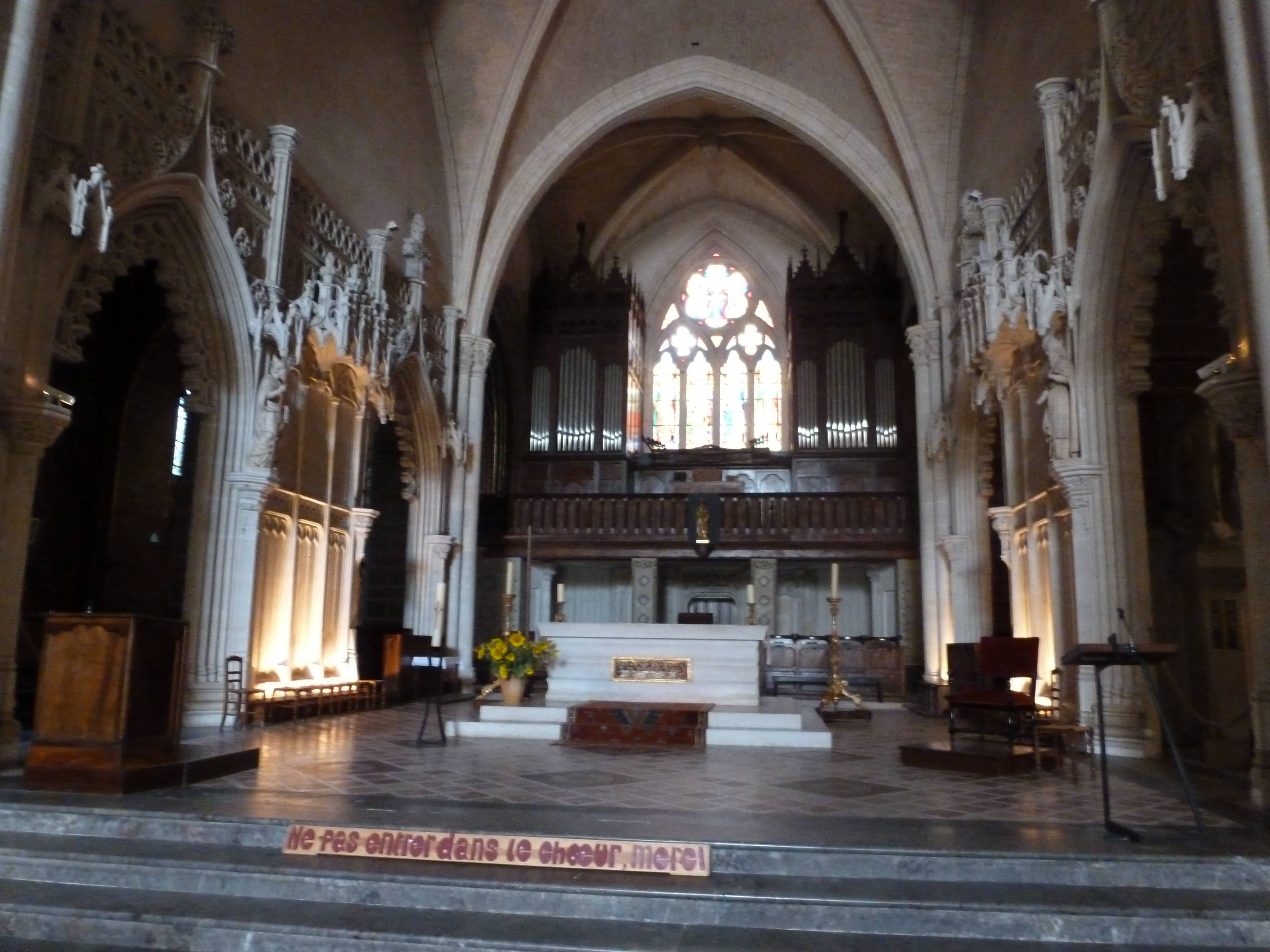 Église Saint-Léger de Cognac (Charente, Poitou-Charentes, France). .